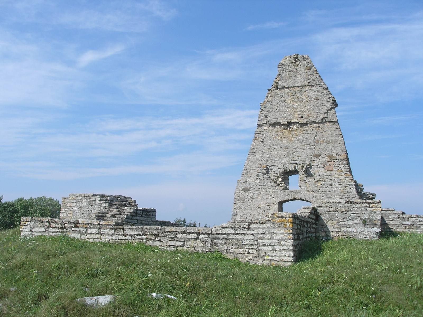 Maarja kabeli varemed Viru-Nigulas.